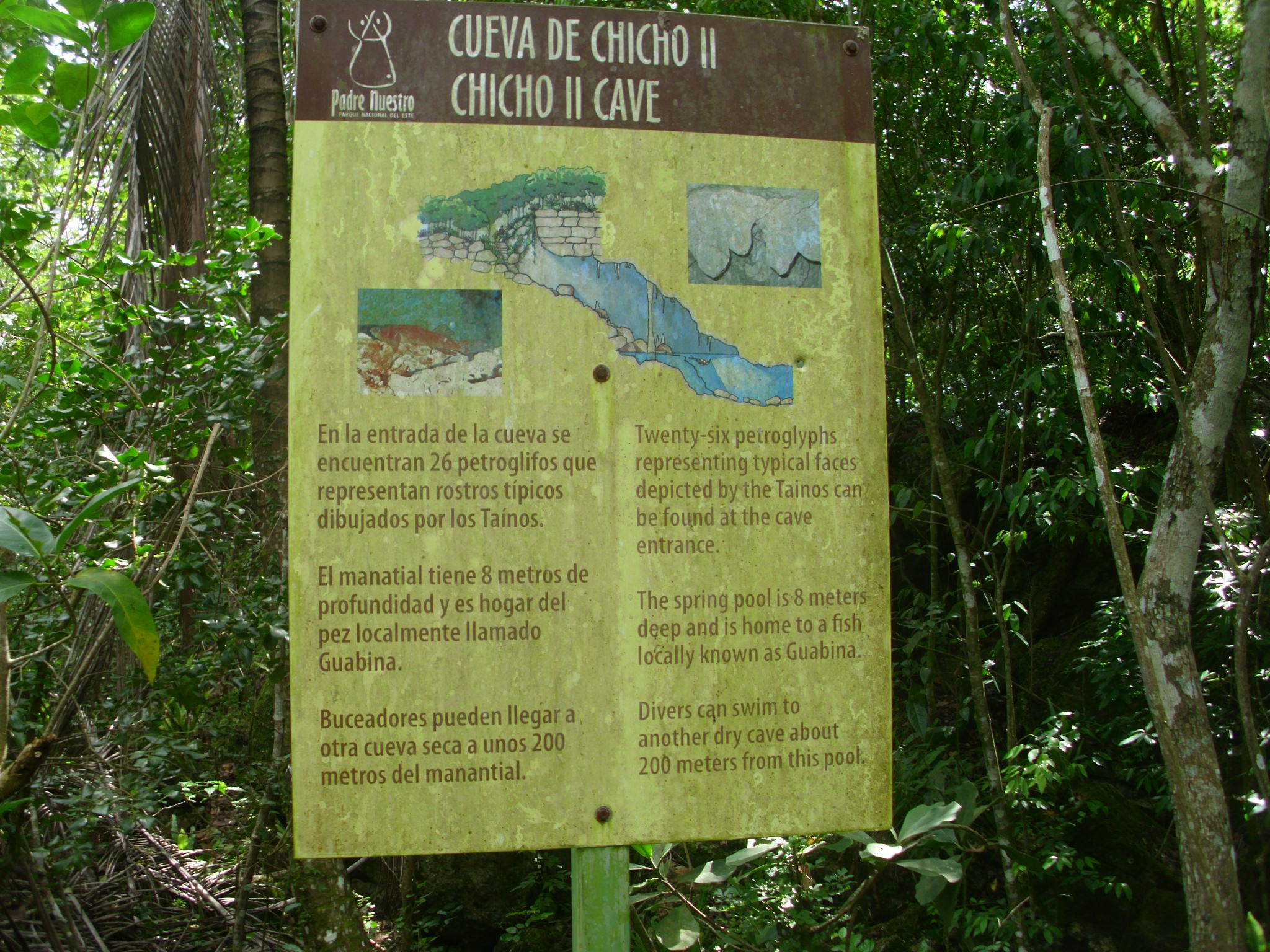 Taïno grotten bij Bayahibe Republica Dominicana